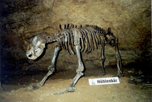 Teufelshoehle near Pottenstein, Höhlenbär